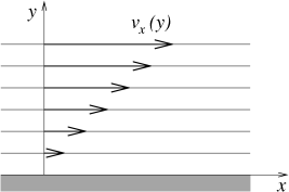 K vpeljavi viskoznosti; plasti laminarnega toka.